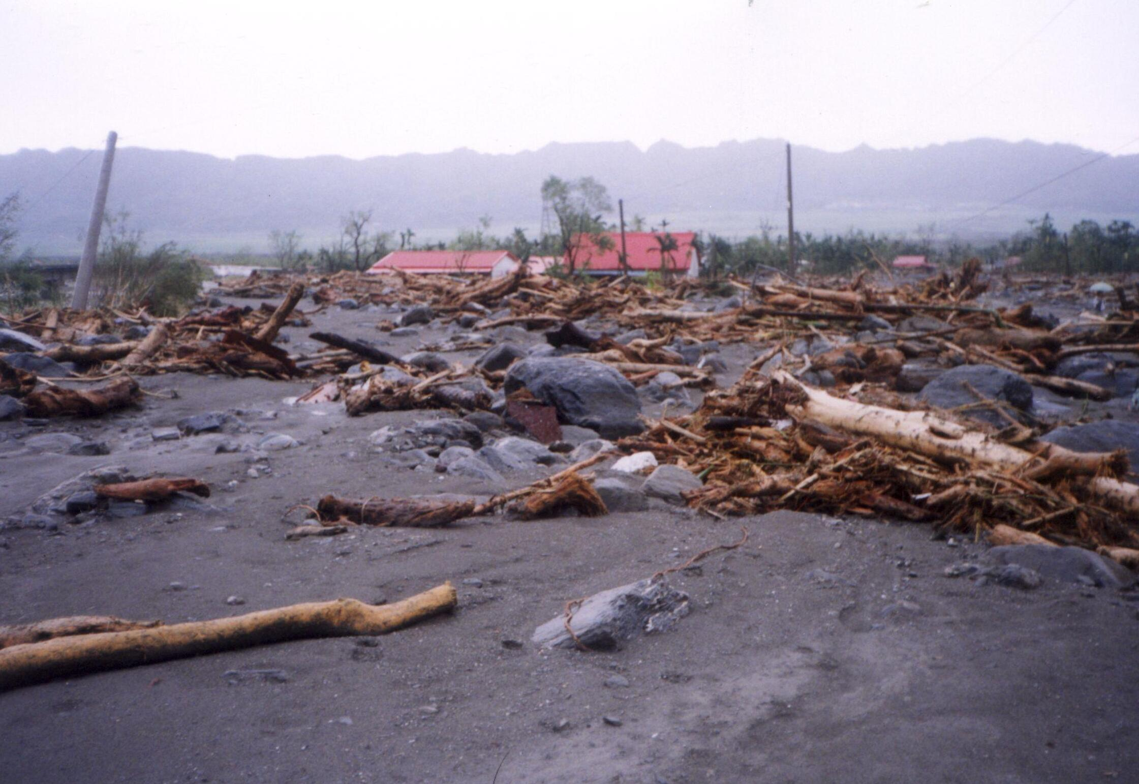 2001年桃芝颱風大興社區遭大量土石及流木入侵